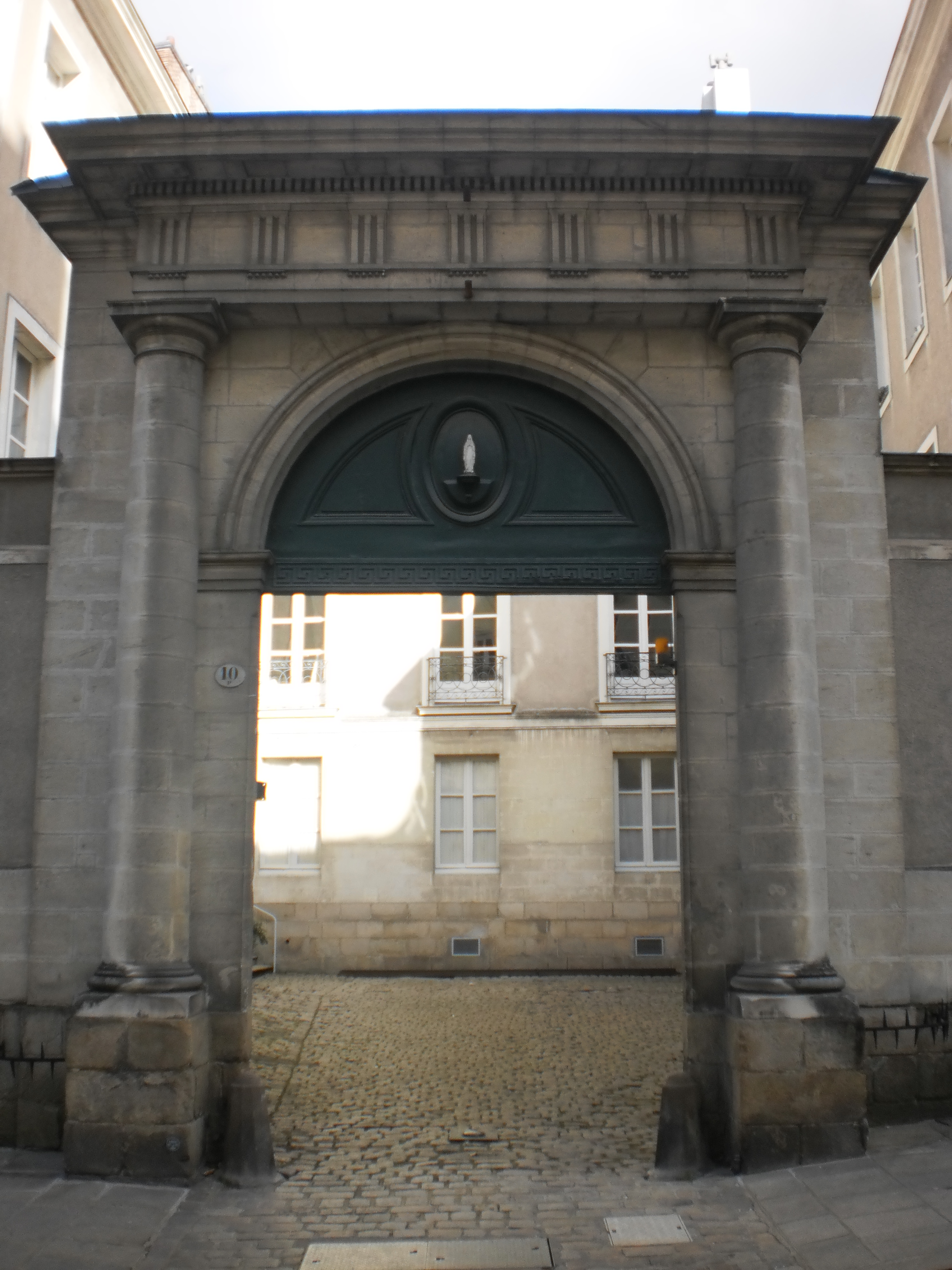 Proche de l'hôtel Commequiers - Rue du Roi-Albert - Nantes (France)